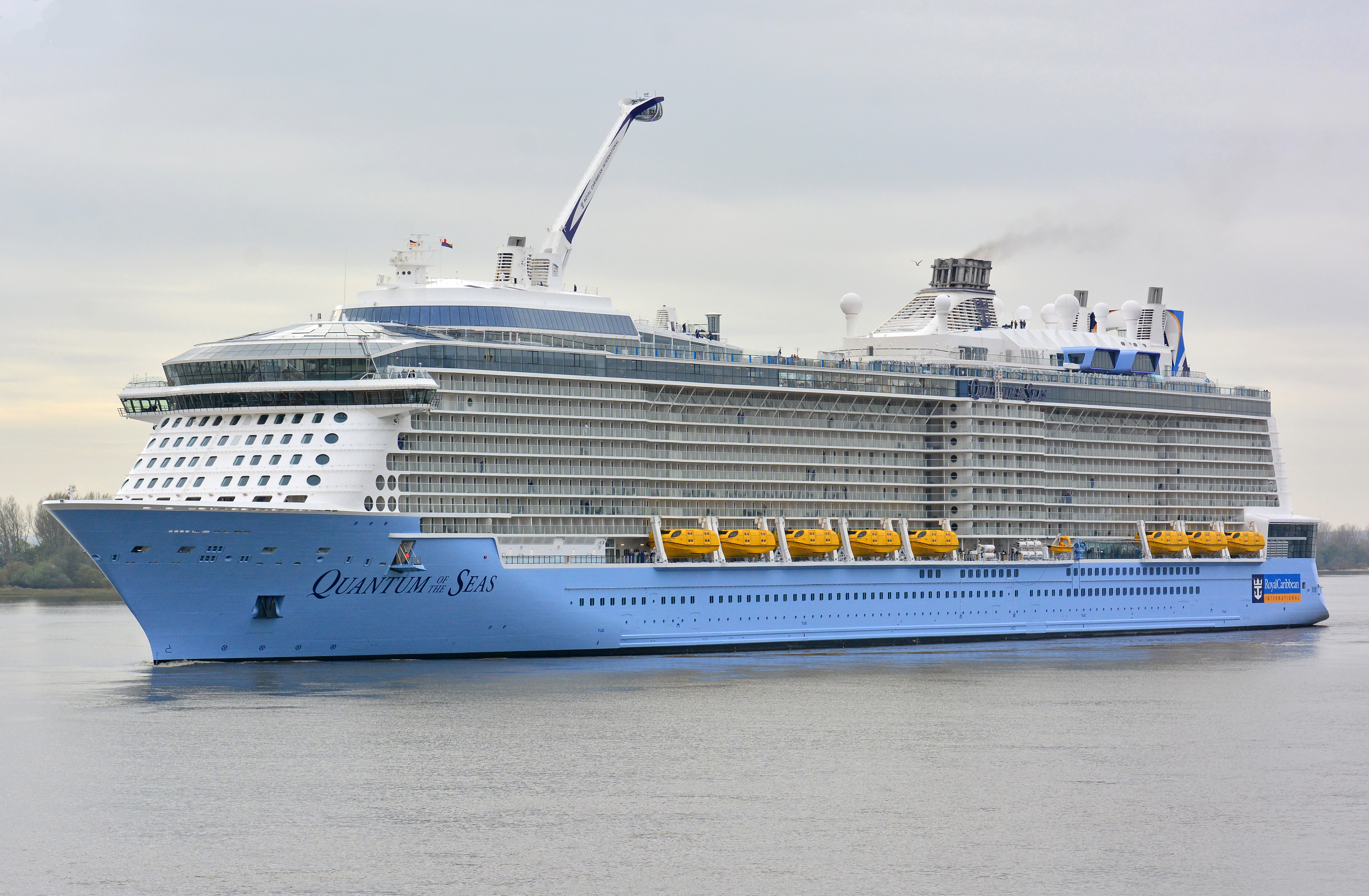 Die Quantum of the Seas auf der Elbe bei Wedel